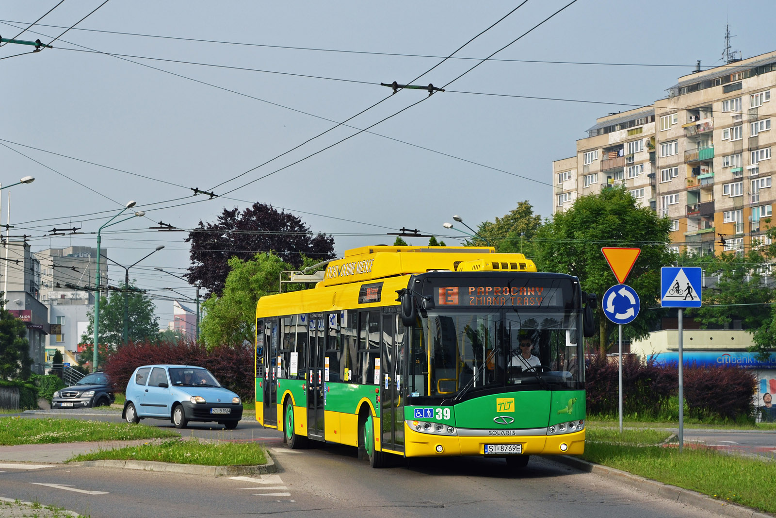 Trolejbus korzysta z baterii trakcyjnych podczas obsługi linii E.